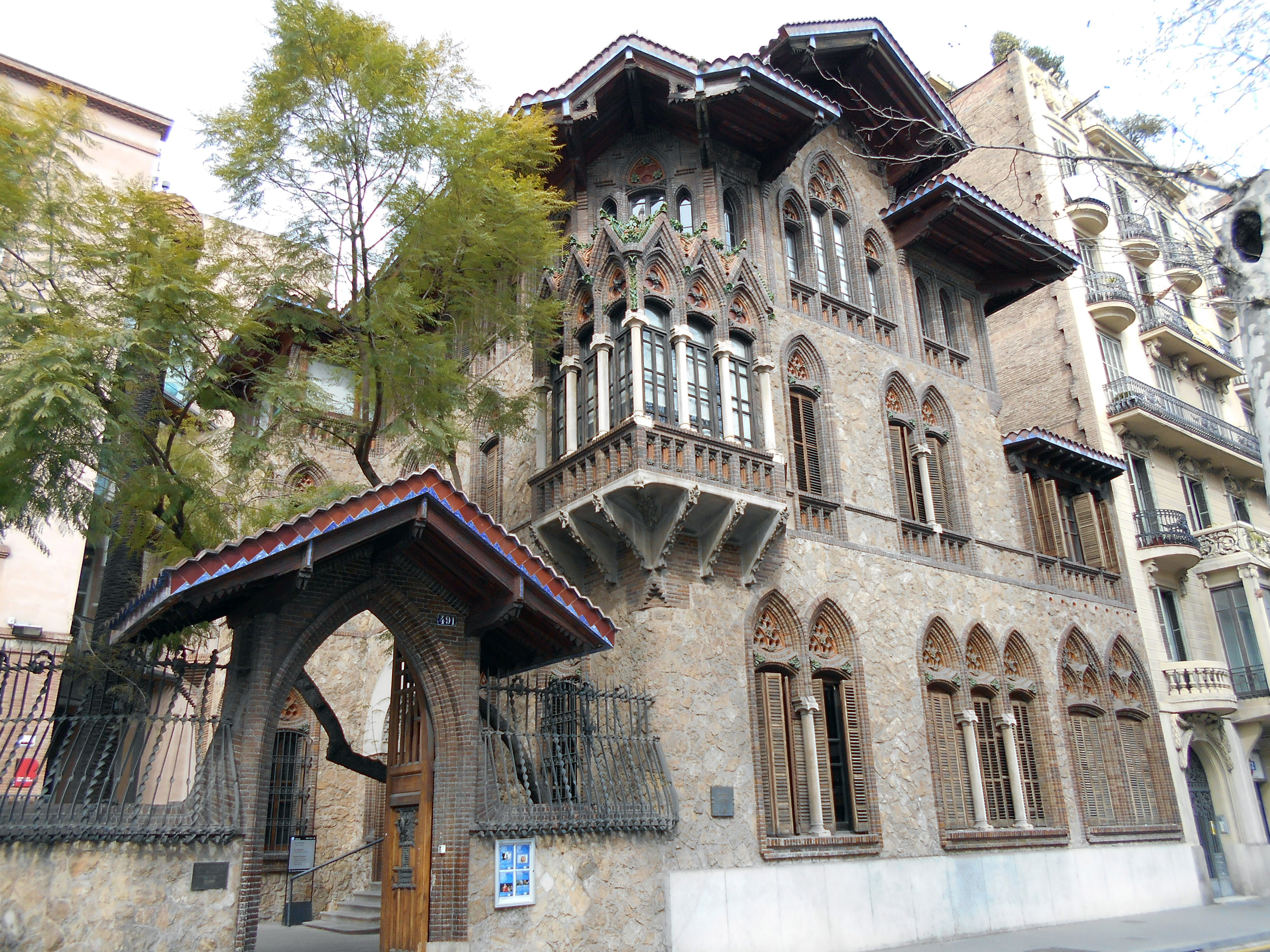 Casa Golferichs (1900-1901), de Joan Rubió.